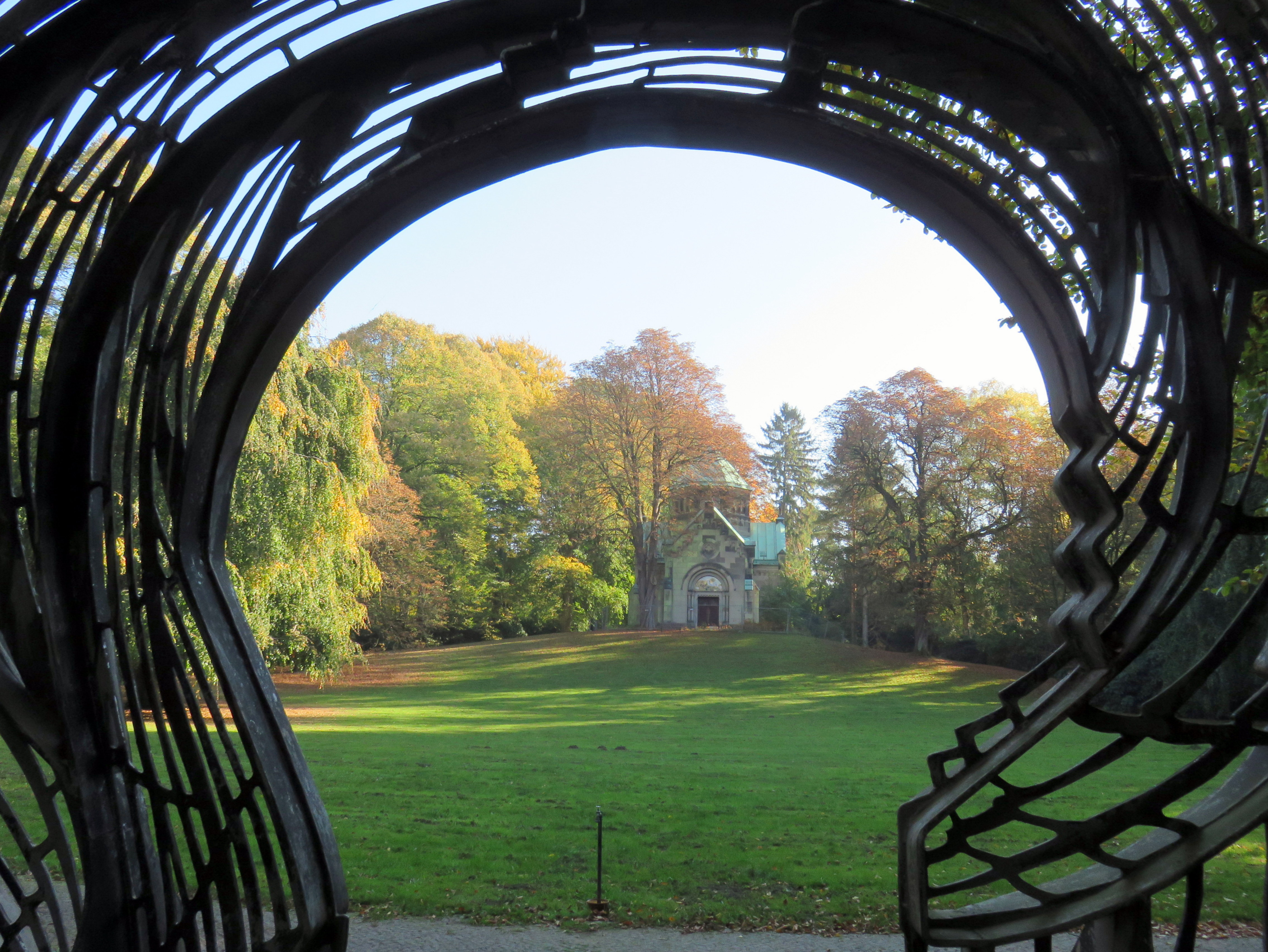 Anonymer Urnenhain vor dem Riedemann-Mausoleum gegenüber Kapelle 8 am Nordring, Ohlsdorfer Friedhof, Hamburg.